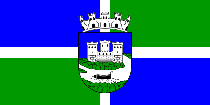 Vlag van Sisak.